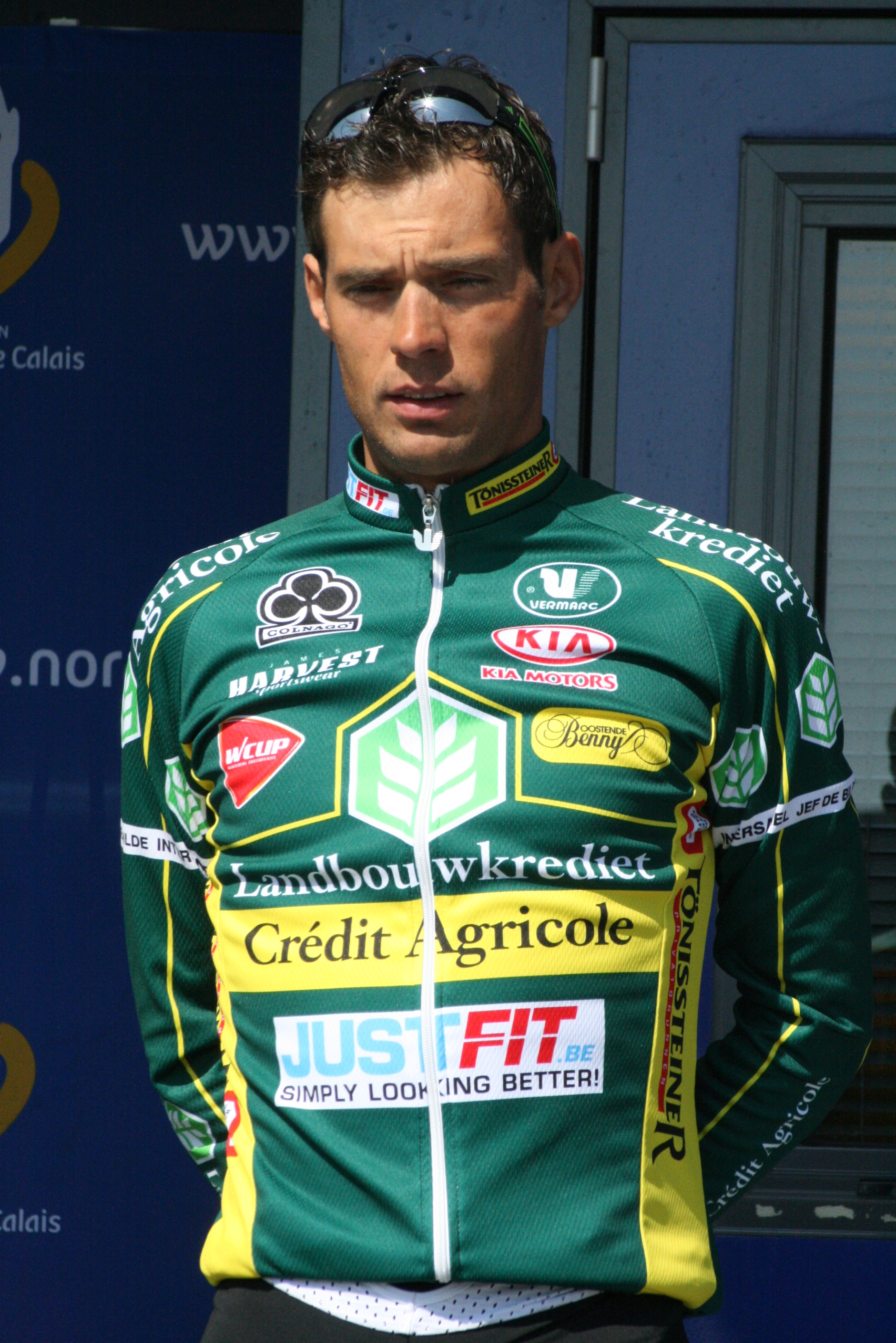 Présentation des coureurs au départ de la première étape Sven Vanthourenhout